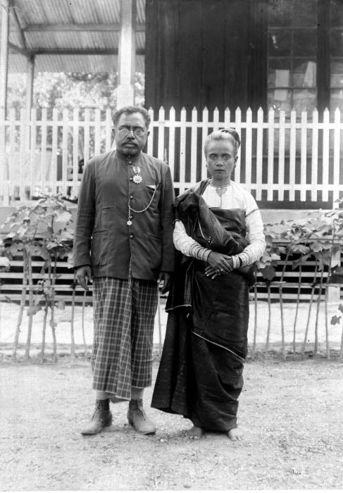 Negatief. Radja Don Josephus da Silva van Sika met zijn vrouw